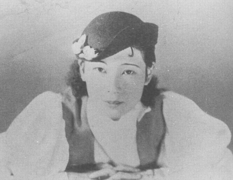 Yōko Sayuri (Japanese, *1901, †1986)